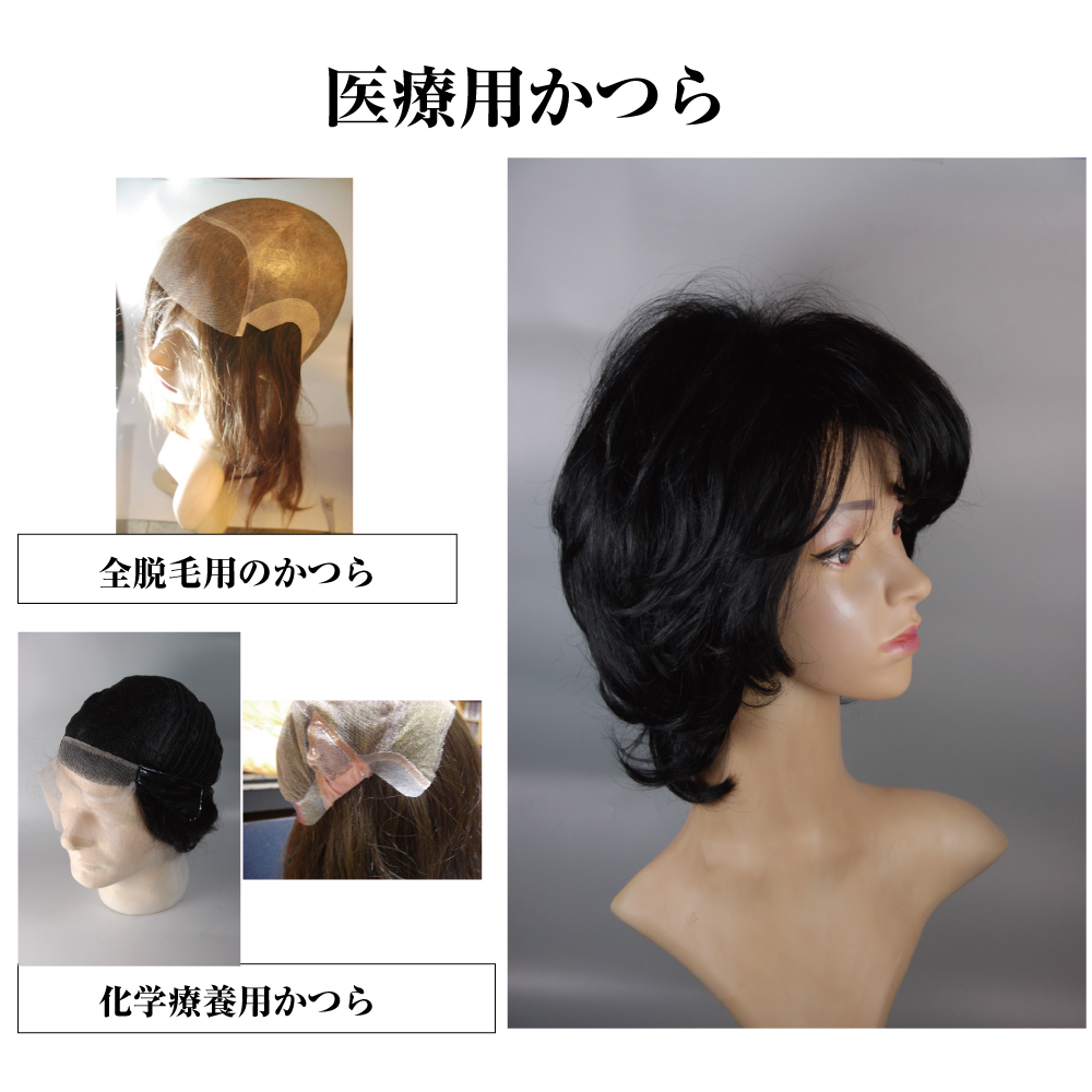 代表的な医療用ウィッグ